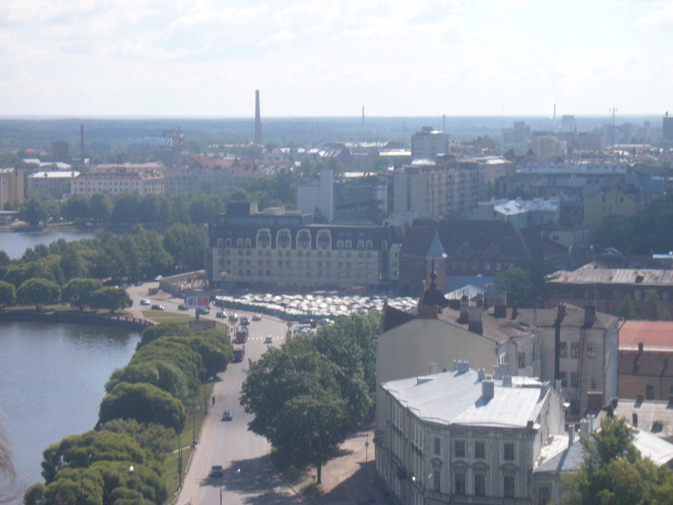 Вид на Рыночную площадь со смотровой площадки Выборгского замка. 2006 год.